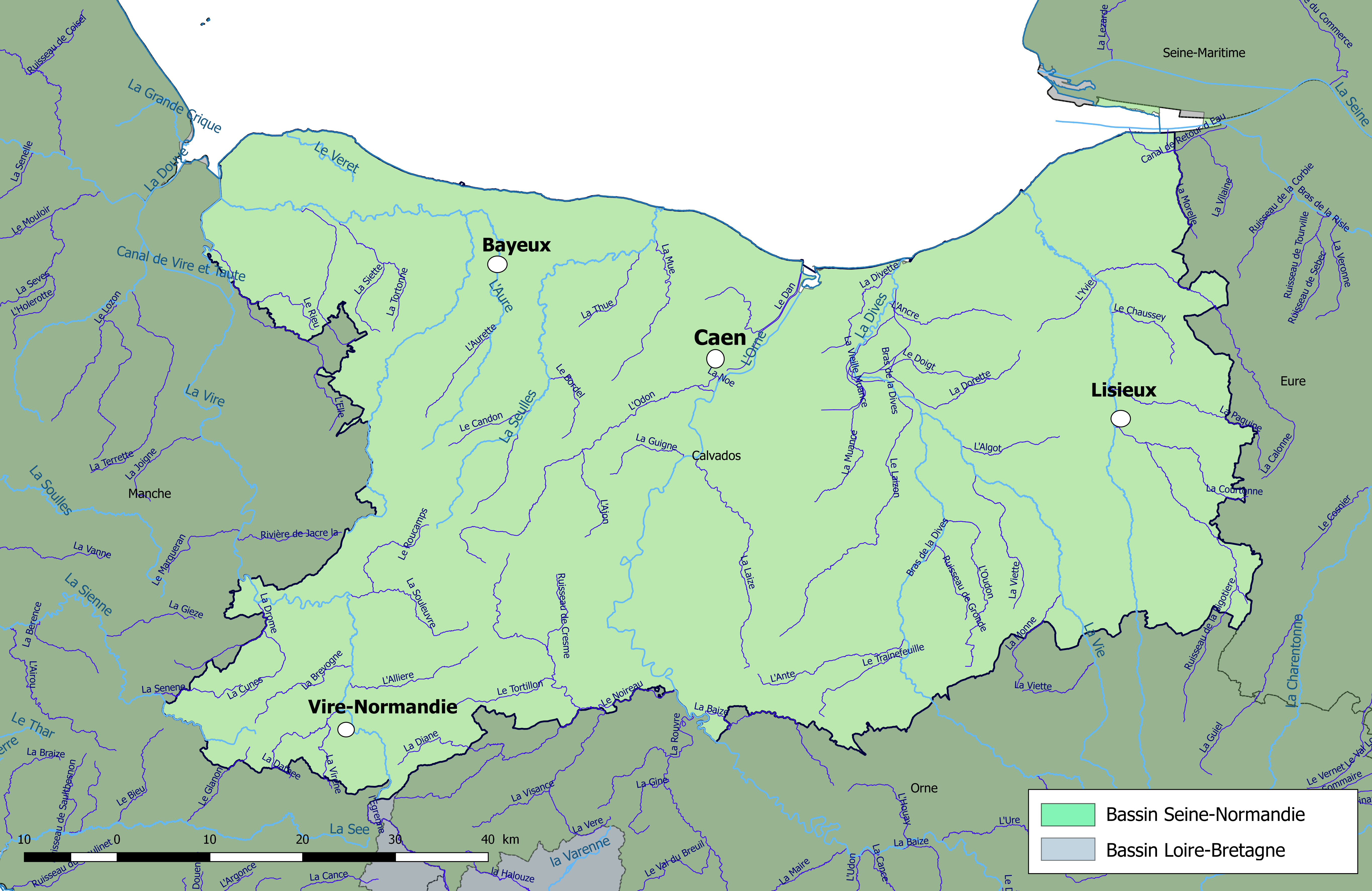 Carte des cours d'eau de longueur supérieure à 10 km et des bassins hydrographiques dans le département du Calvados (France)